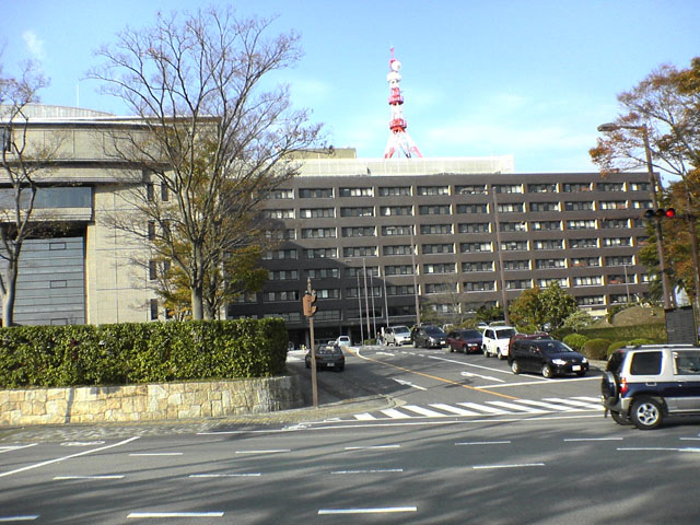 三重県庁 投稿者が撮影